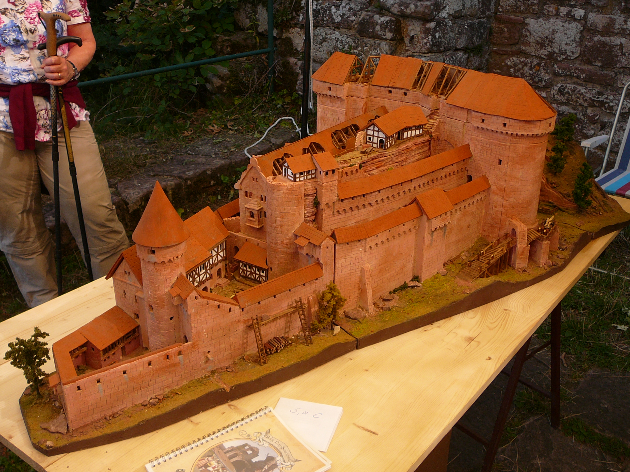 Modell von Burg Scharfeneck; Konstruktion Erich Merz 2012